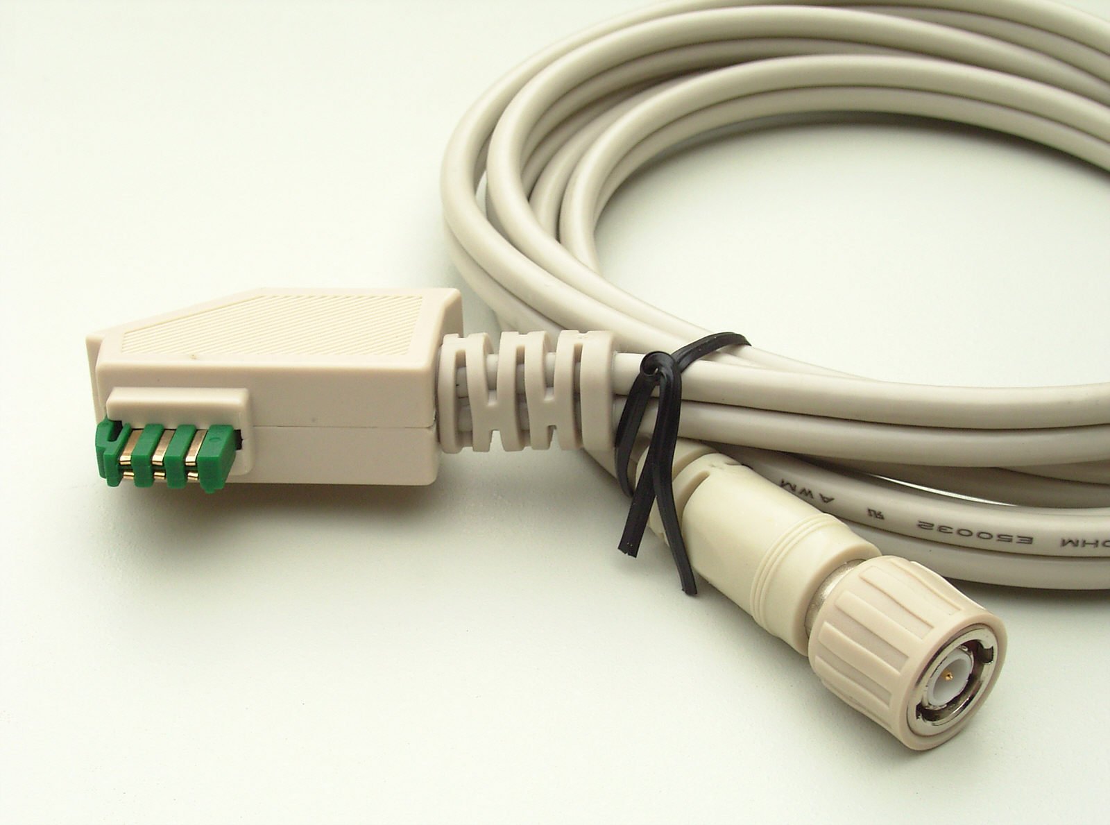 EAD-Kabel für eine flexible Ethernet-Verkabelung (10base2)